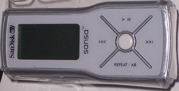 Sandisk Sansa m240 in clear vinyl case, taken by myself